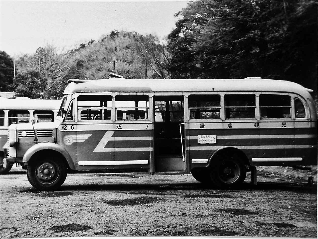 いすゞBX91型バス 1949年式 帝國車体 江ノ島鎌倉観光